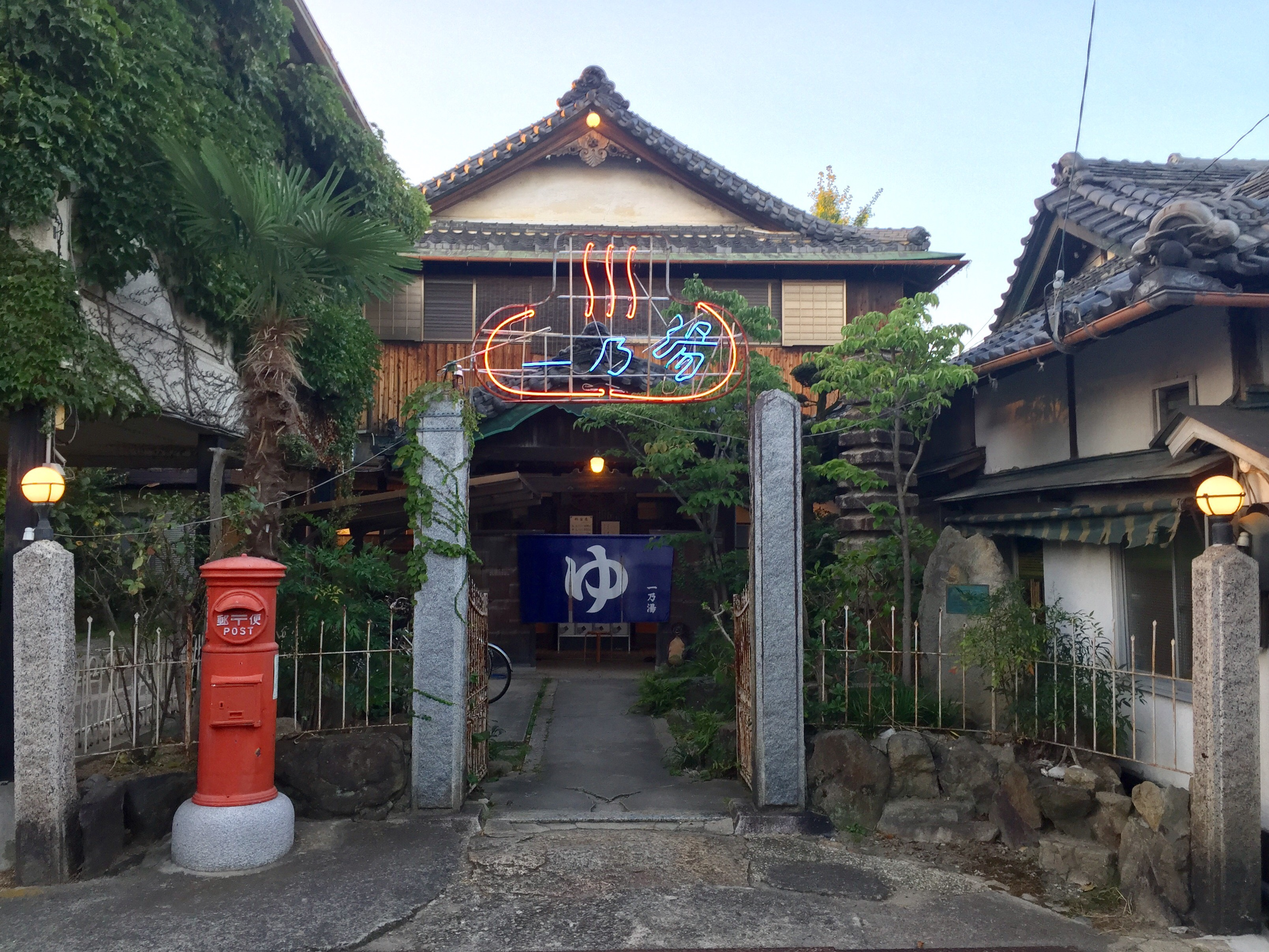 三重県伊賀市の銭湯「一之湯」の外観と石柱門。唐破風屋根の本館と石柱門が登録有形文化財に登録されている。